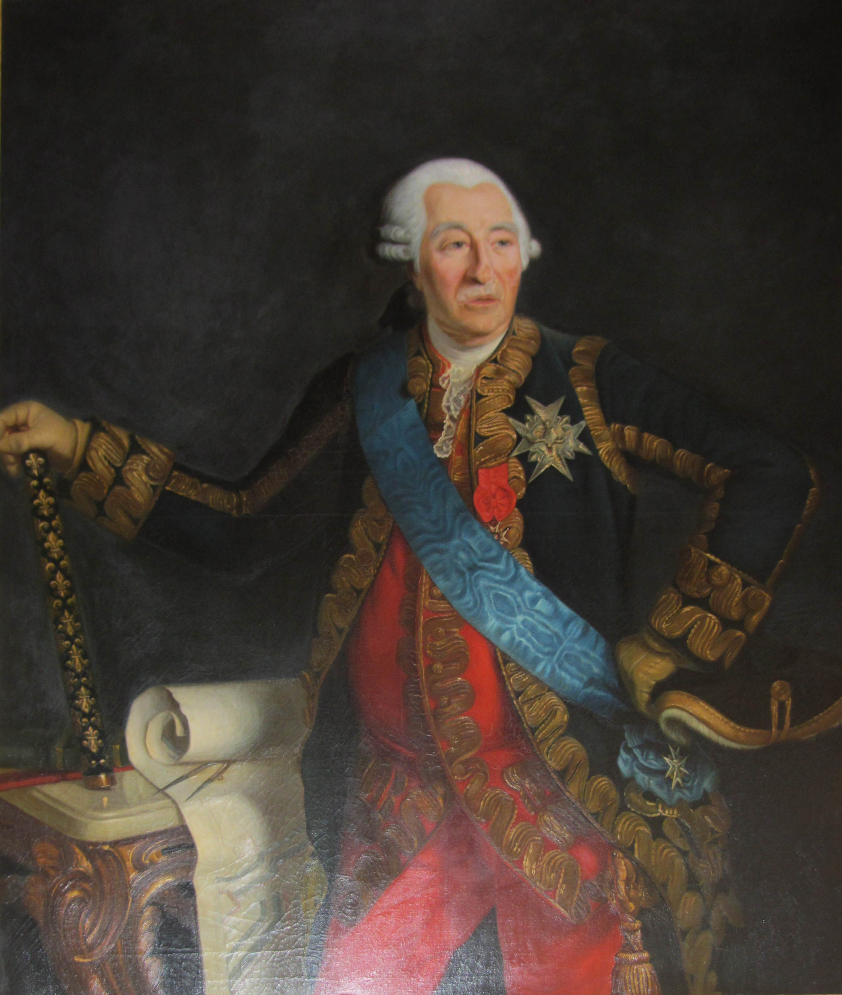 Château de Tocqueville - Portrait d'Anne Pierre d'Harcourt (1701-1783) This document was produced using the Canon PowerShot SX230 HS lent by Wikimedia France.